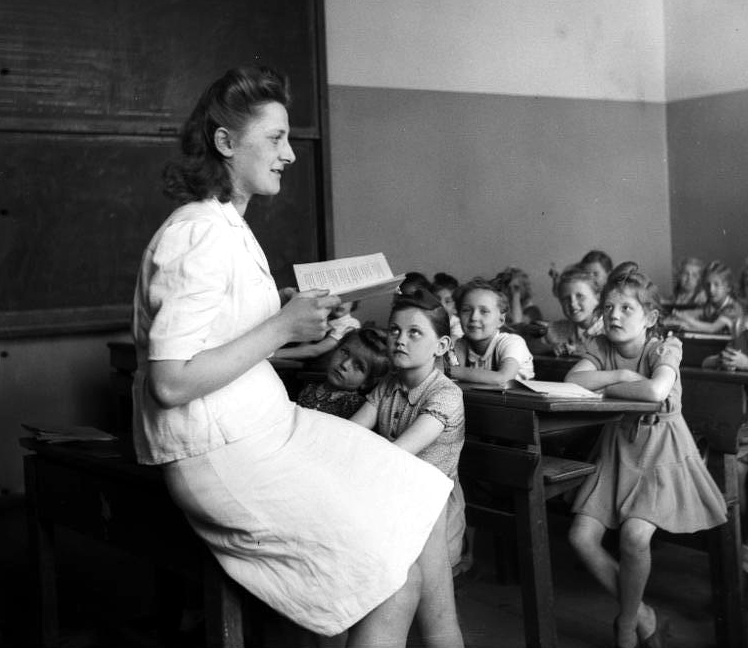 Schulklasse und Lehrerin ADN-ZB /Illus-Heinscher 23.6.1947 Der Aufbau der demokratischen Schule in der Sowjetischen Besatzungszone Deutschlands,Juni 1947 Nach der Entfernung der faschistischen Kräfte aus dem Schuldienst, traten antifaschistisch-demokratische Menschen an ihre Stelle. UBz Eine Neulehrerin, 29 Jahre alt, beim Schulunterricht in einer Mädchenklasse einer Volksschule. 625-47